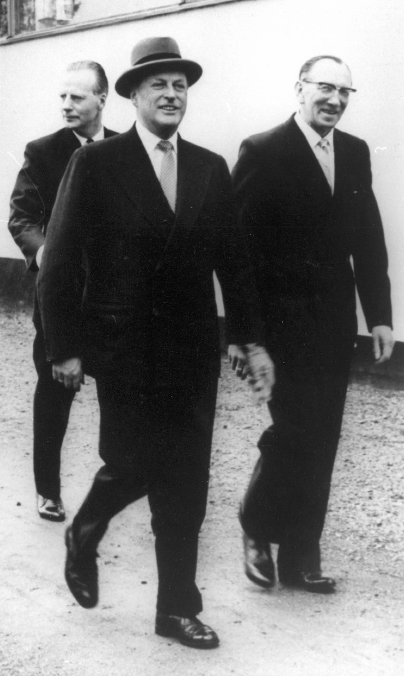 Erling Juell Aune (født 31. januar 1899, død 15.juli 1979) var ordfører i Lillehammer fra 1960 til 1963. Han representerte Arbeiderpartiet. Som ordfører var han aktiv i sammenslåingen av Fåberg og Lillehammer kommune i 1964. Han hadde administrative stillinger i Televerket i en årrekke, hvor han også var ansatt som distriktssjef når han gikk av med pensjon. Aune ble tildelt Kongens fortjenestemedalje i gull i 1969.